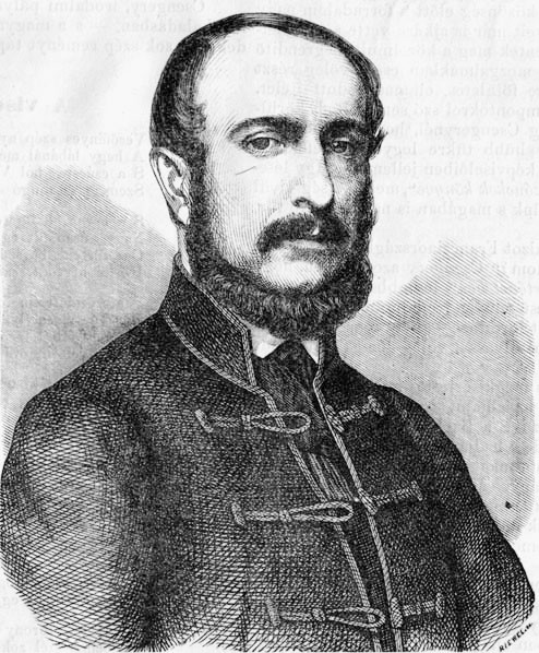 Csengery Antal (1822–1880) politikus, az MTA másodelnöke portréja. Vasárnapi Ujság, 1860